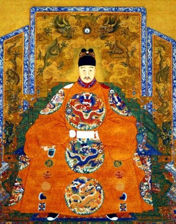 Longqing